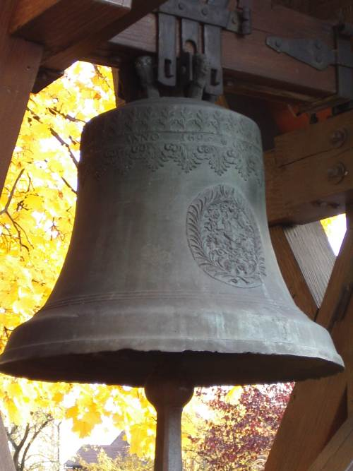 Beschreibung Poppenreuth (Fürth), Kirchenglocke von 1695, 2003-11-04 Quelle Fotographie November 2003 Fotograph --Keichwa Copyright Status GNU Freie Dokumentationslizenz